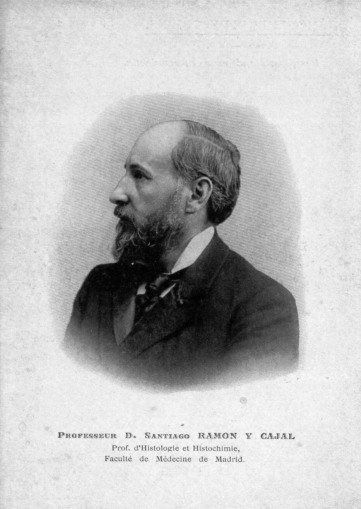 Foto di D. Santiago Ramon Y Cajal (1852-1934), docente di Istologia e Istochimica presso la facoltà di Medicina di Madrid.